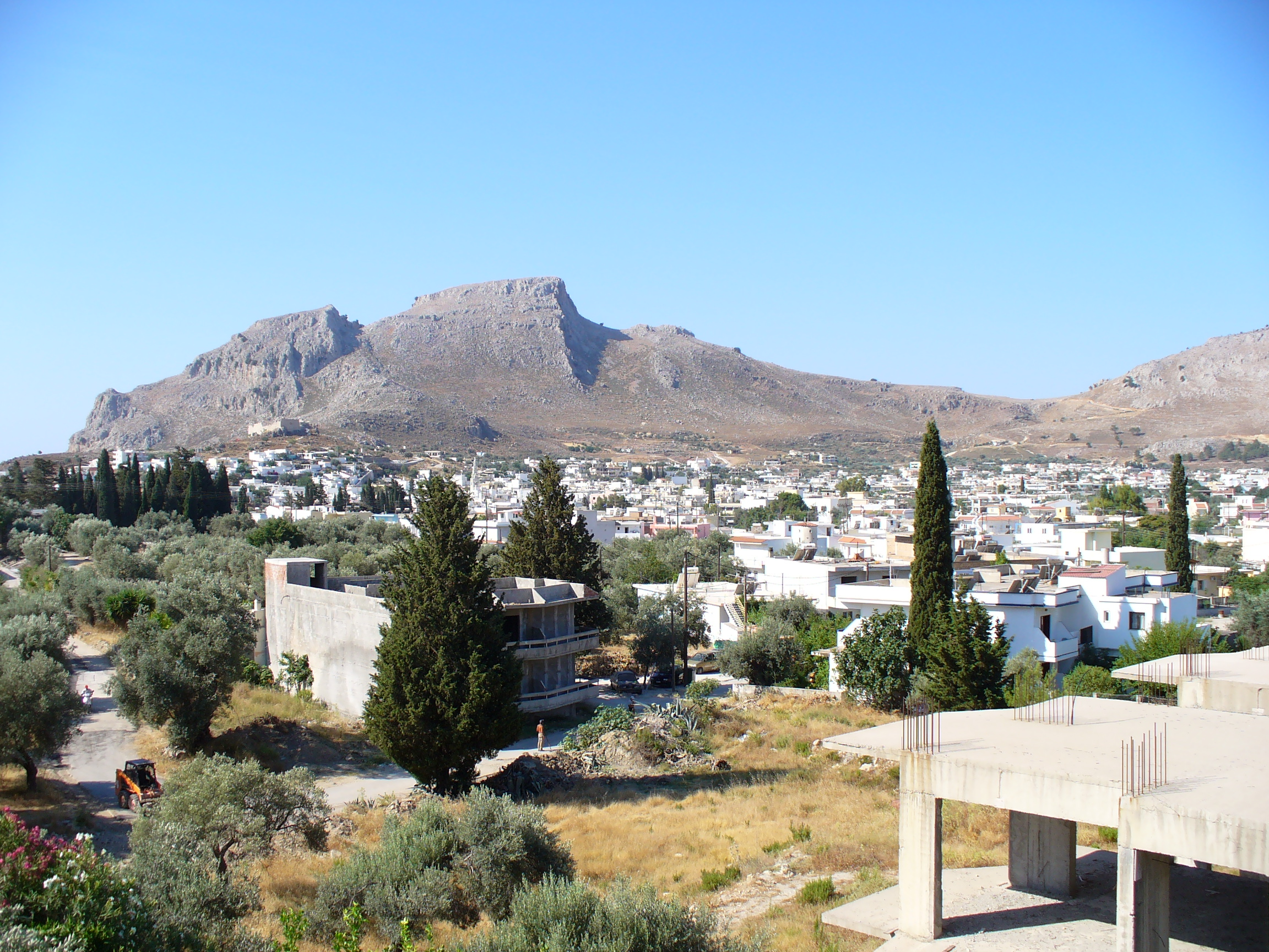 Archangelos auf Rhodos, Blick von Norden über den Ortskern zum Kastell